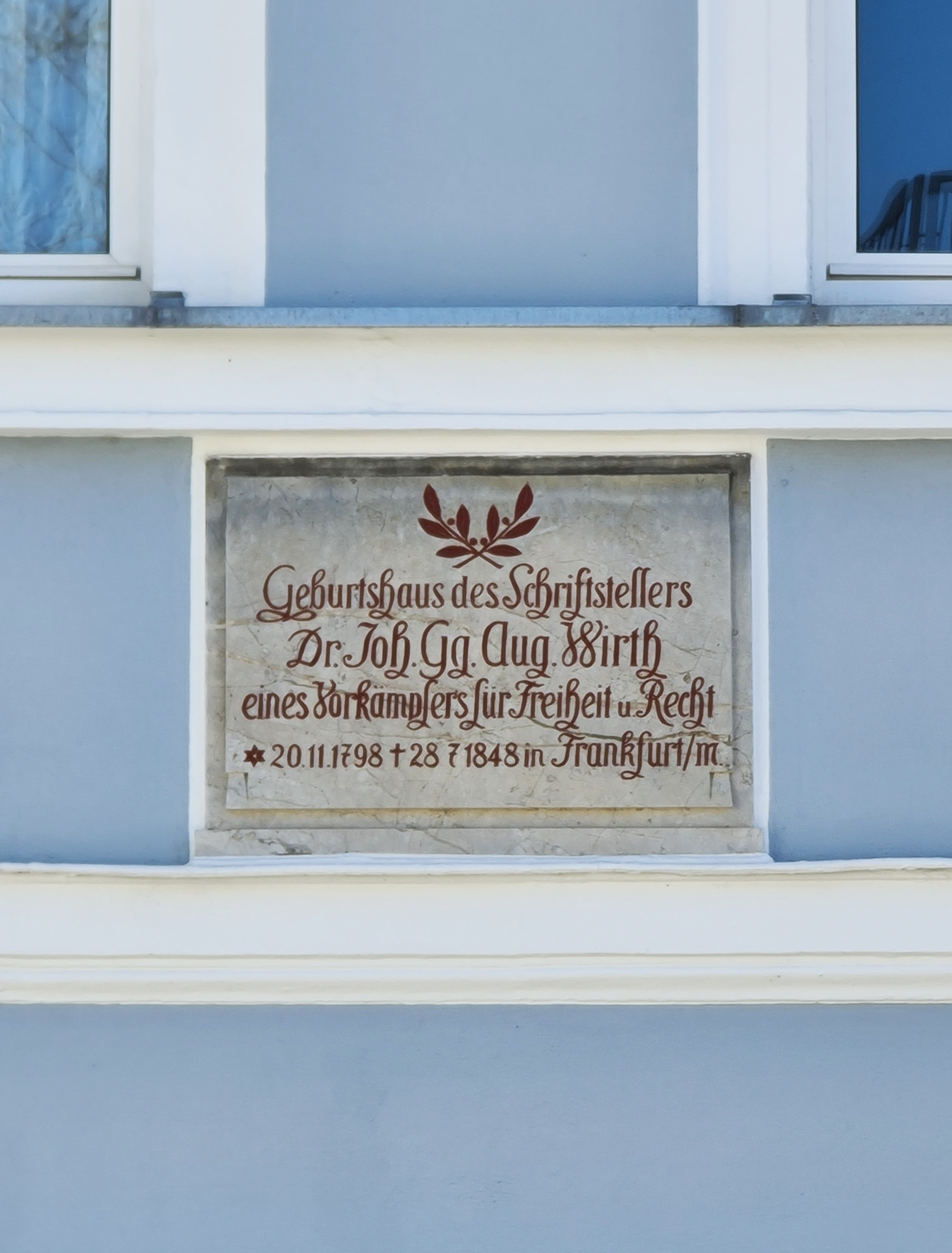 Geburtshaus Wirth in Hof an der Hospitalkirche Hof.